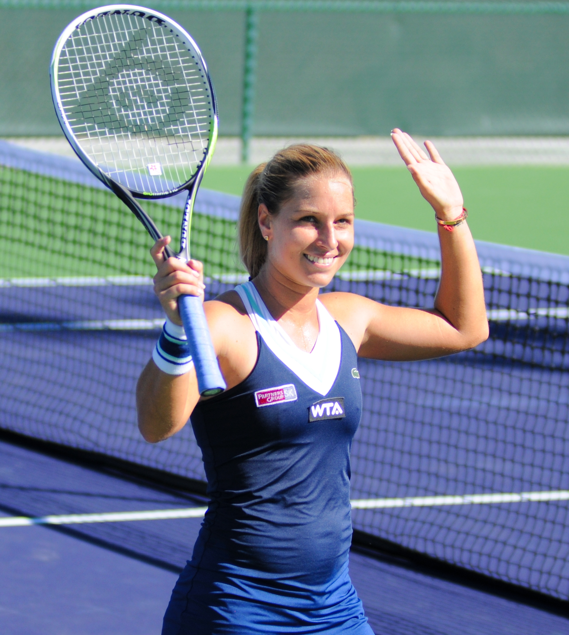 2014 BNP Paribas Open